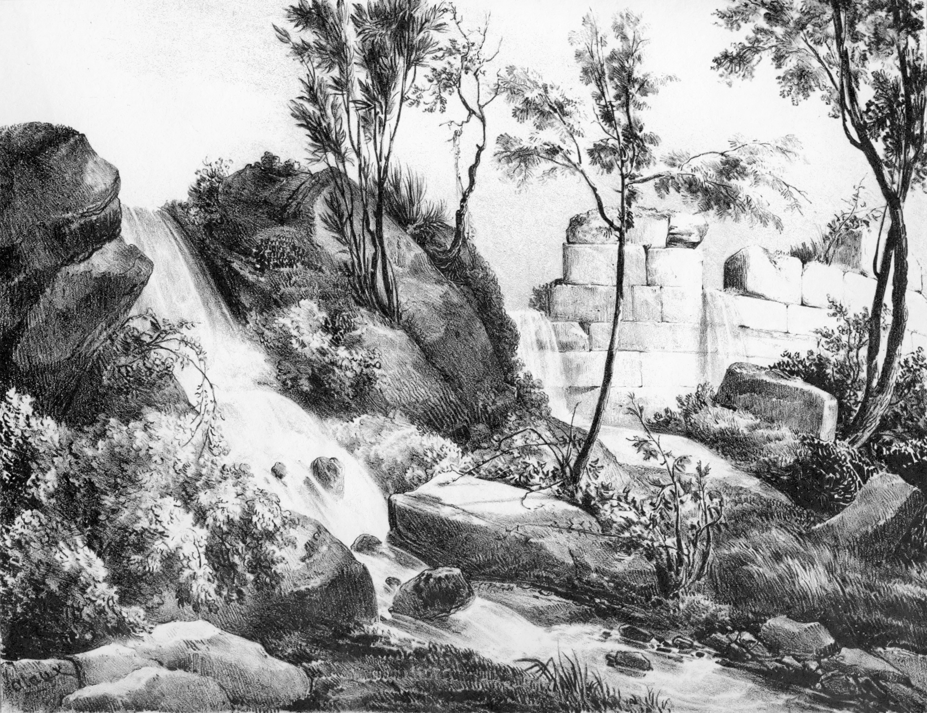 Ruines romaines dans la Vallee d'Antre